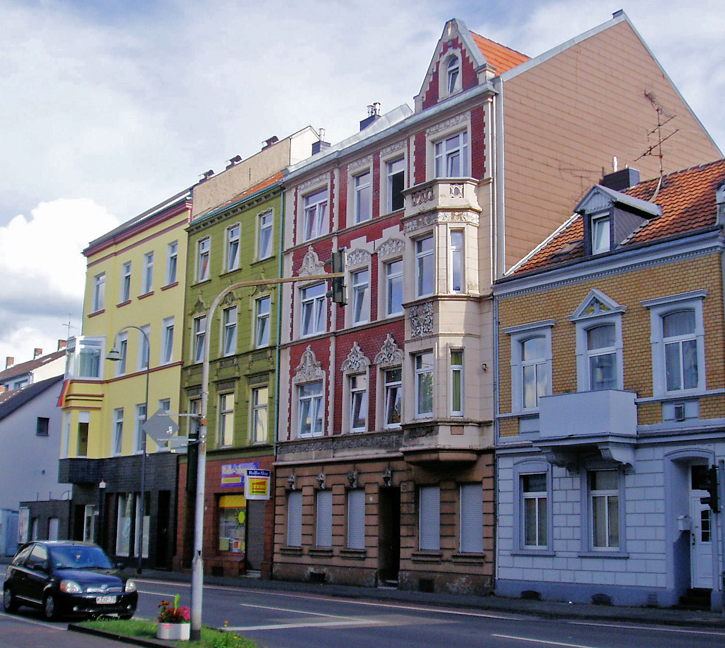 Gründerzeitbauten an der Olpener Str. in Köln-Höhenberg